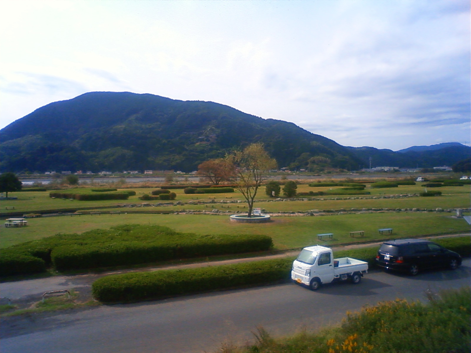 安倍川公園